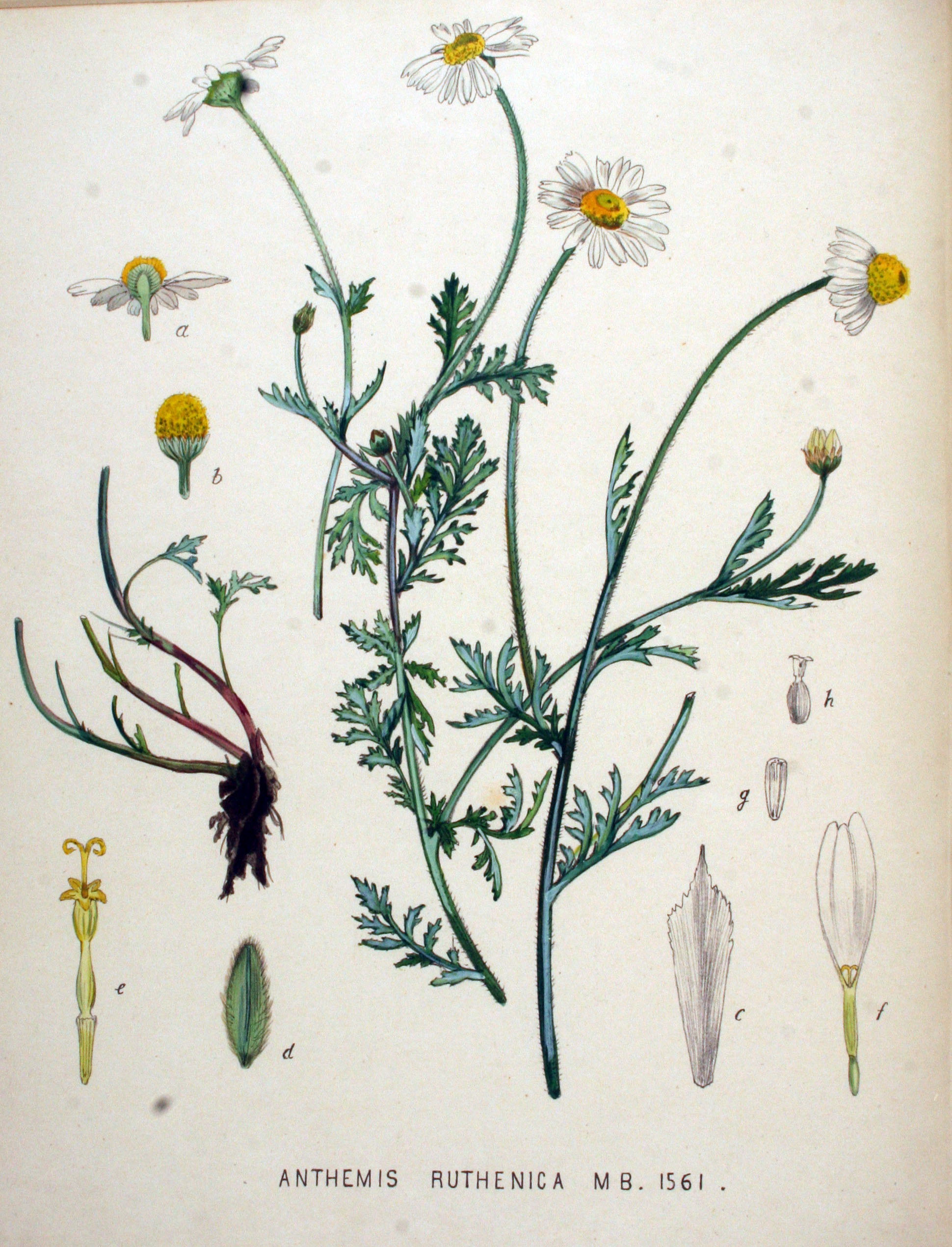 Anthemis ruthenica